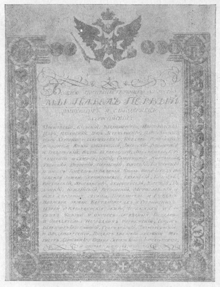 Указ Павла I об образовании Российско-Американской компании. Из книги: Судьба Русской Америки / А. И. Алексеев. – Магадан, 1975. – С. 130.